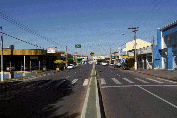 Avenida Nove de Abril em Mogi Guaçu, Brasil